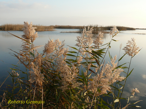 piante lacustri dei bacini di ugento